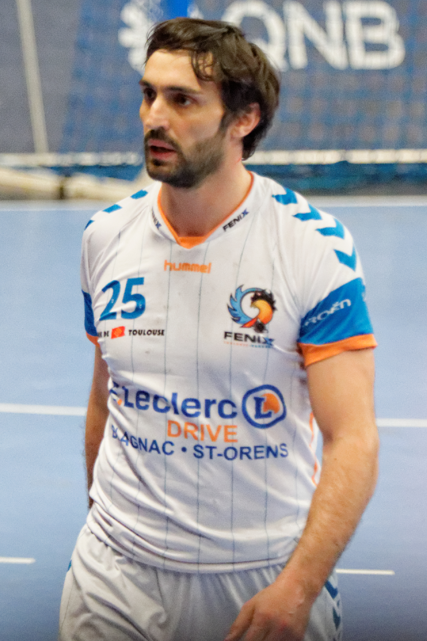 PSG Handball / Toulouse Fenix Handball lors de la 21e journée du championnat de France de handball masculin le 16 avril 2016 au stade Pierre de Coubertin à Paris.